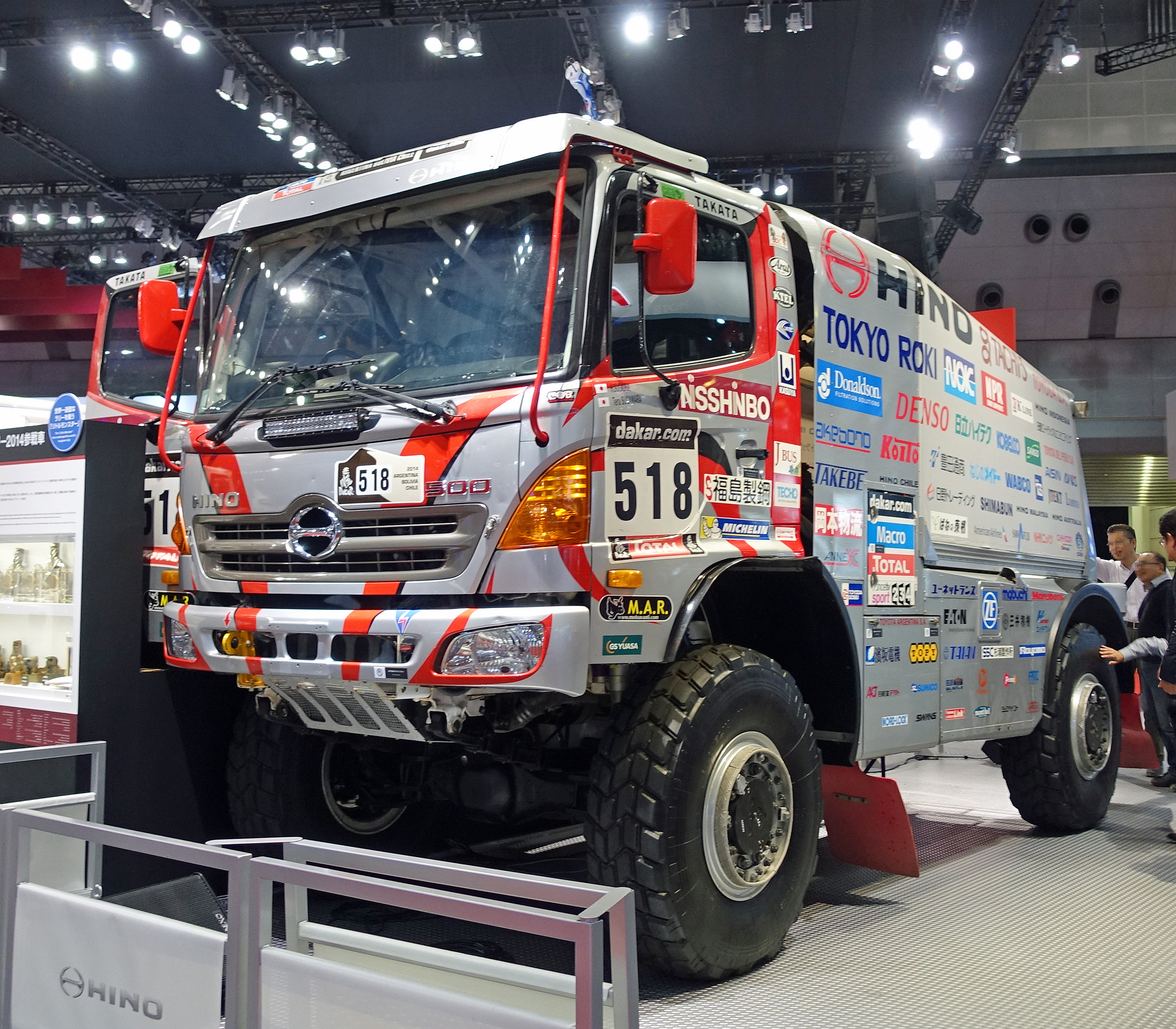 日野・レンジャー（パリ・ダカールラリー2014の優勝車）